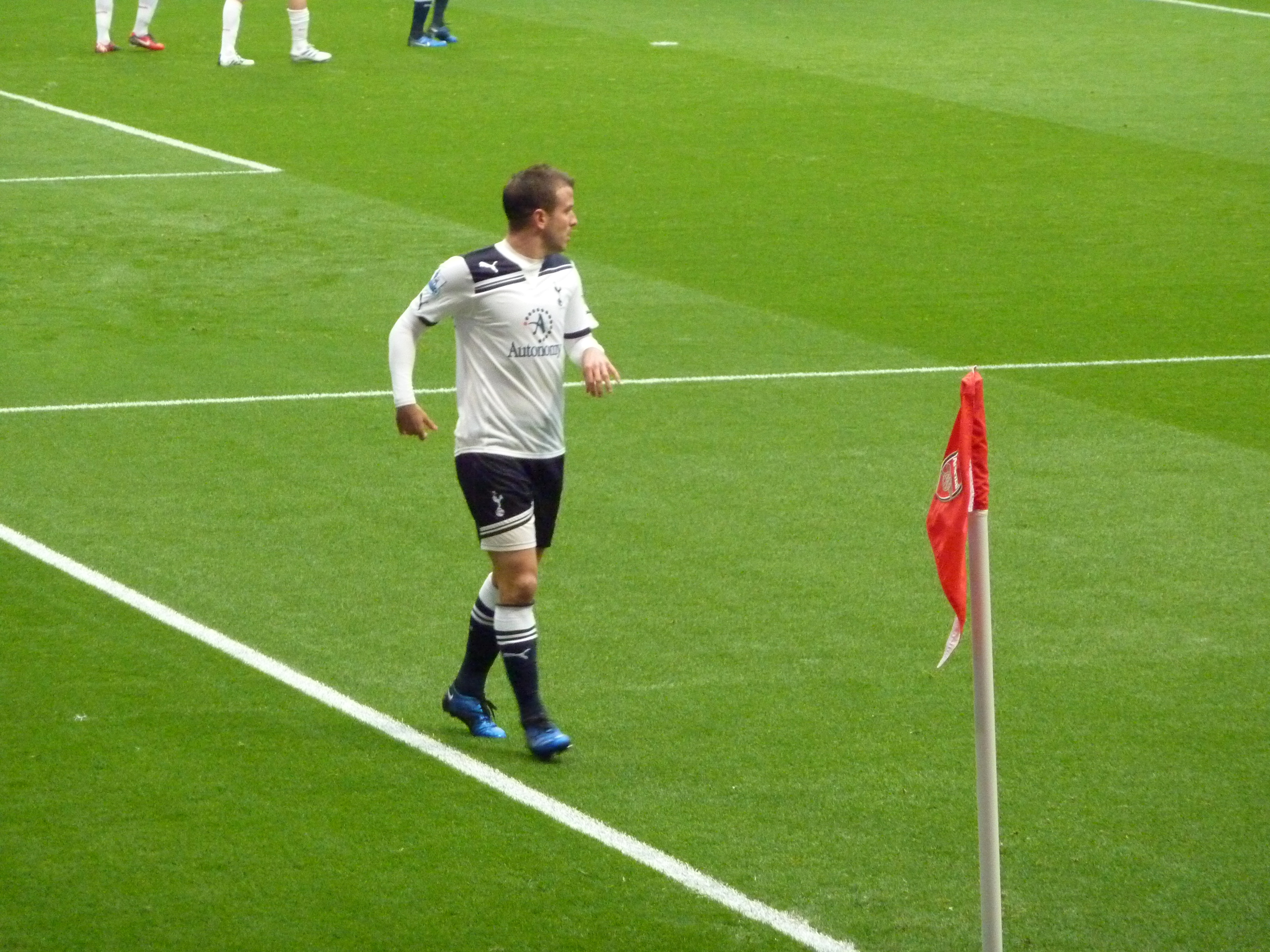 Rafael van der Vaart of Tottenham against Arsenal.